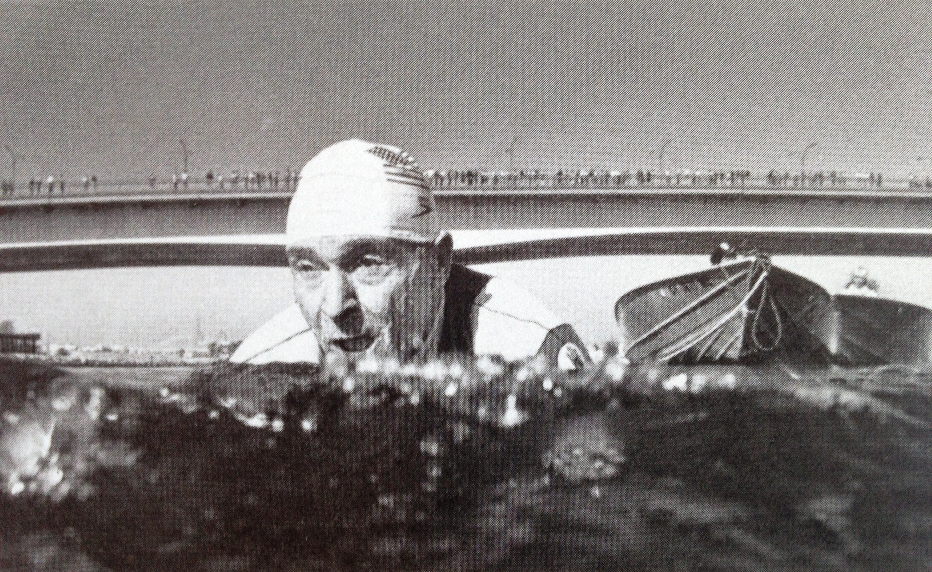 Dieses Photo zeigt Jack Lalanne als er 70 Boote mit je einer Person beladen, an Händen und Füßen gefesselt, 1,5 Milen hinter sich her zieht.